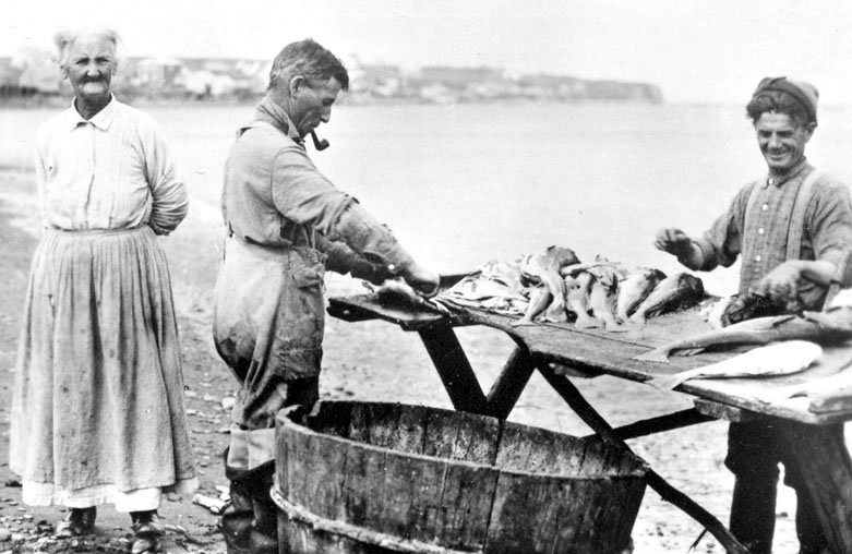 Photographie représentant le tranchage de la morue sur la grève à Rivière-au-Renard. On y aperçoit Luce Blouin (épouse de Stanislas Métivier), accompagnée de ses fils, Adrien et Nestor Métivier.